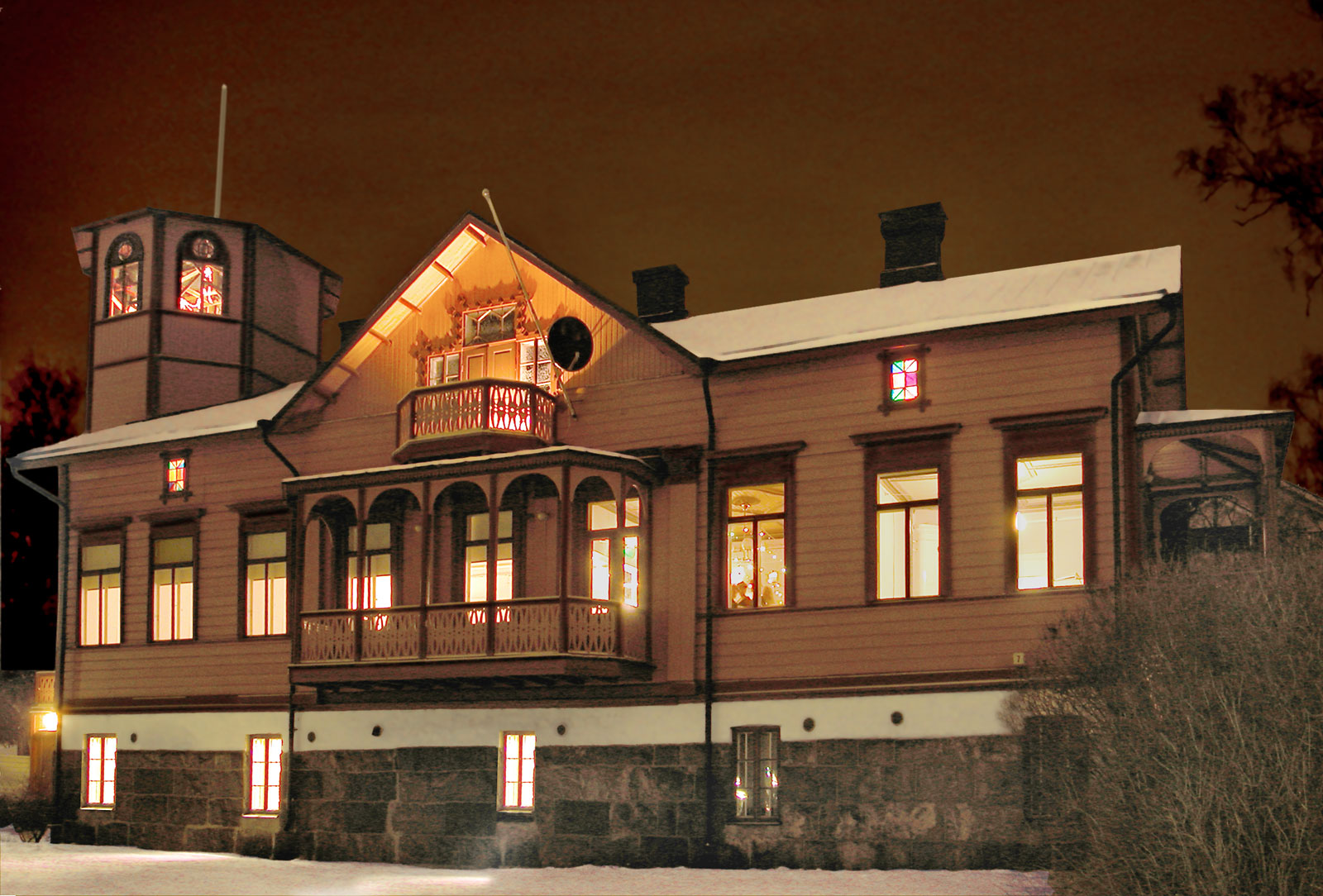 Oulunkylän Seurahuone, jossa mm. Oulunkylän Pop & Jazz Opisto on toiminut.